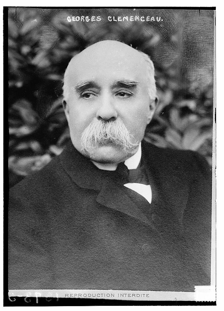 El político y primer ministro francés Georges Clemenceau.